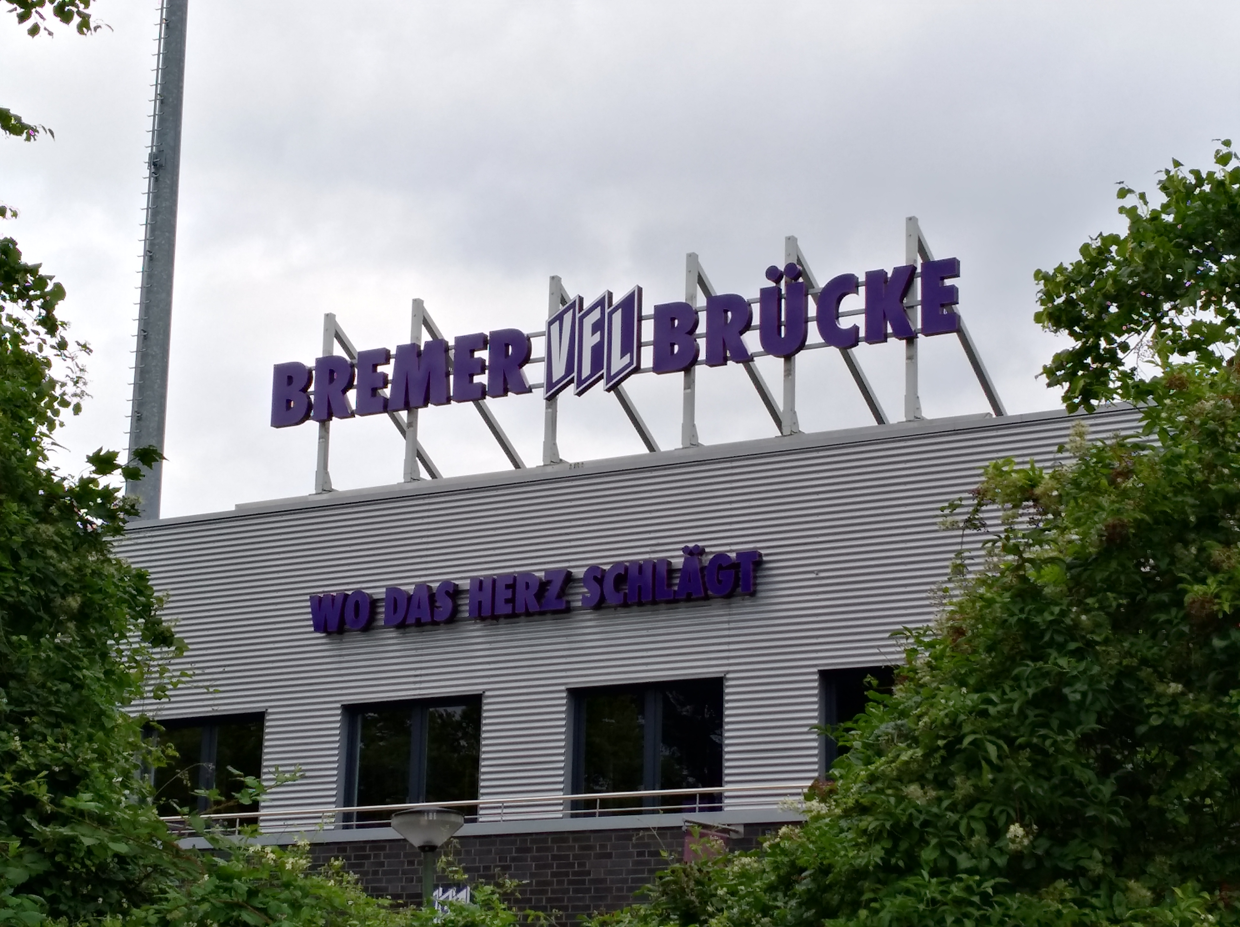 Der Schriftzug "Wo das Herz schlägt" am Stadion an der Bremer Brücke in Osnabrück.